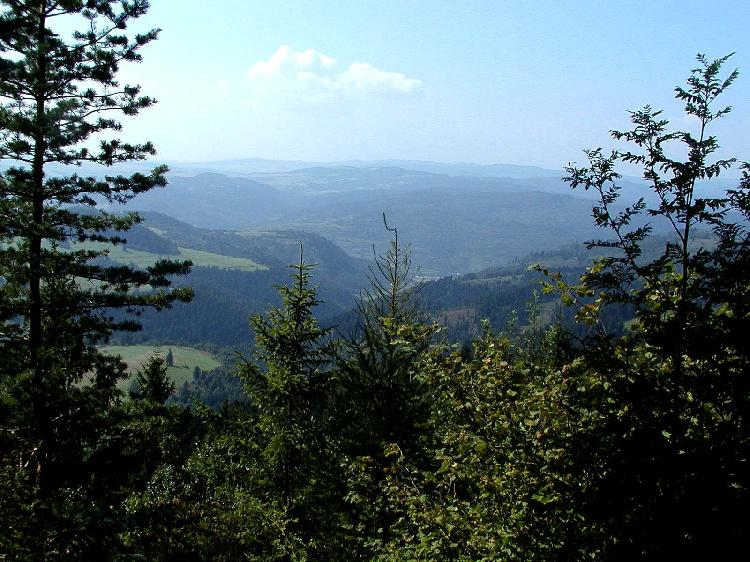 Levočské vrchy (hills)(Slovakia)